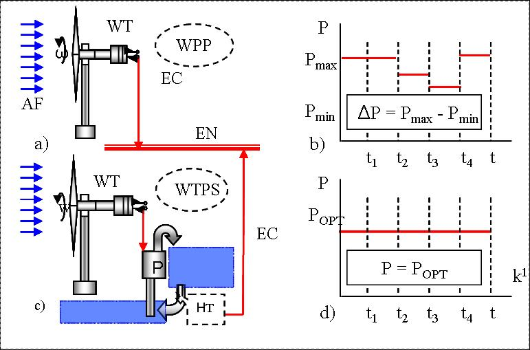 Вихідна потужність вітрової електростанції WPP та вітротурбінної гідроакумулювальної електростанції WTPS